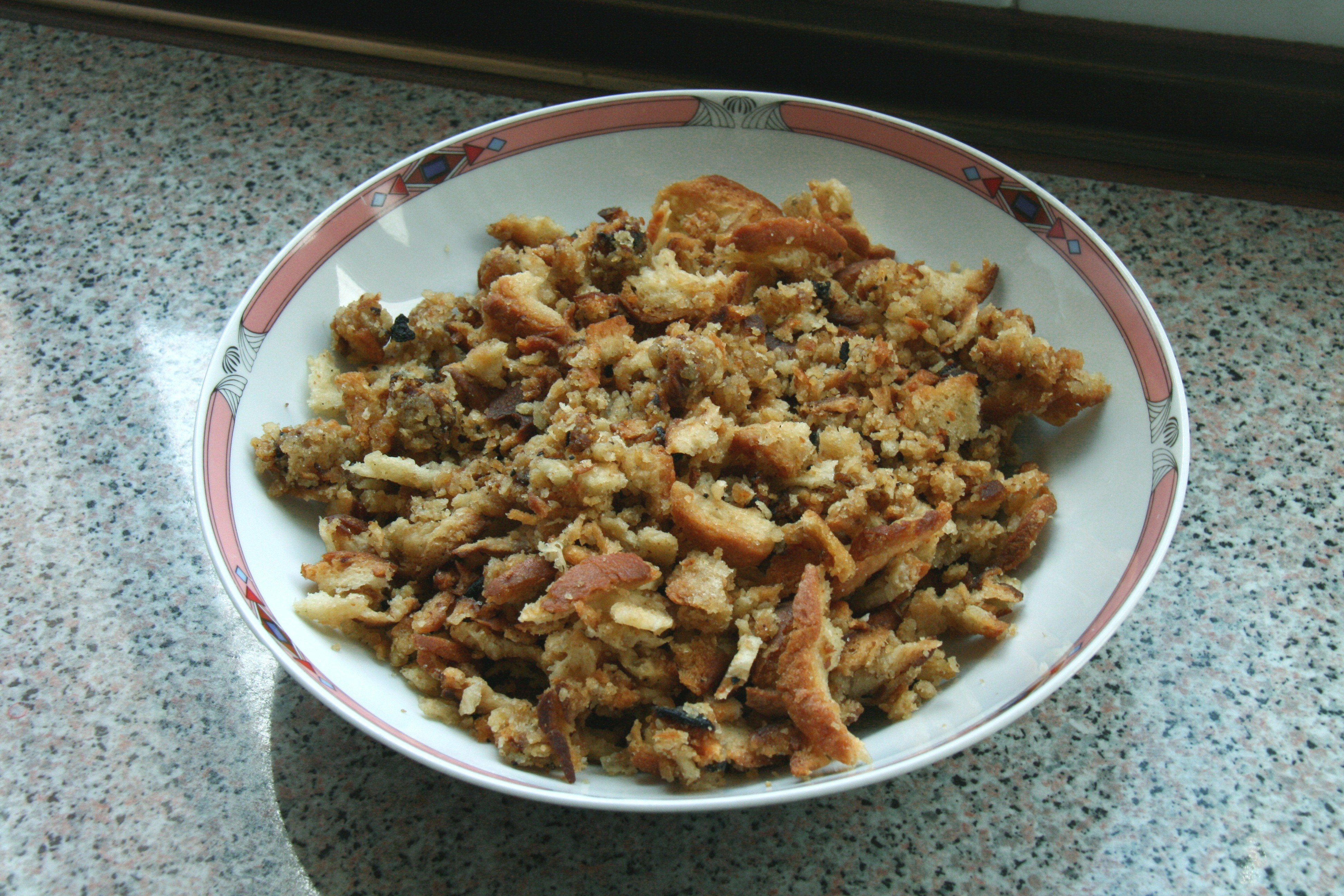 Turriyones - Torrillones sind ein typisches Wintergericht der Provinz Zamora. Die Turriyones entstehen aus einer Mischung von drei Zutaten: Schweineschmalz, Brotkrümel und Zucker oder Heidehonig.